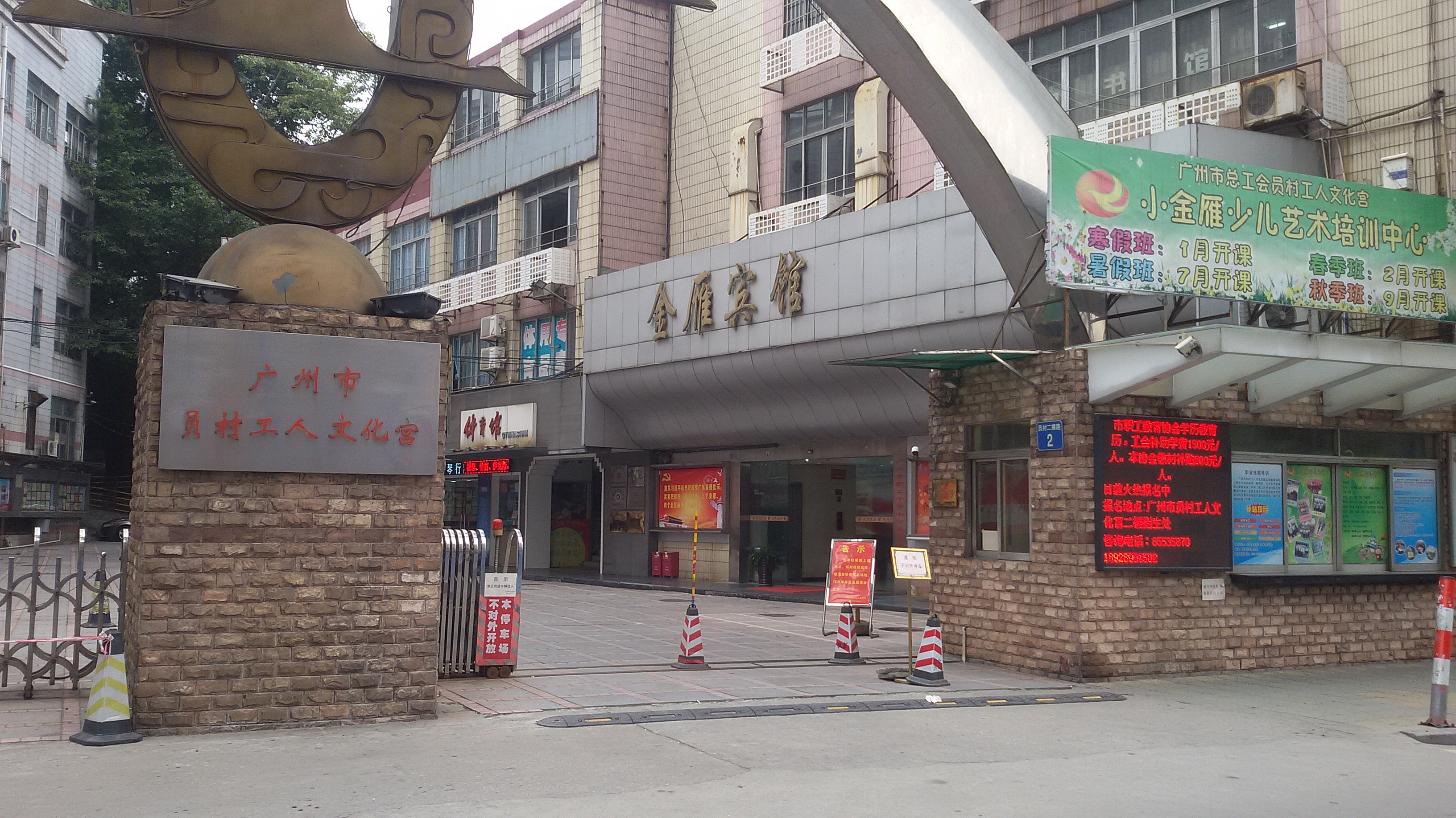 粵語: 員村工人文化宮